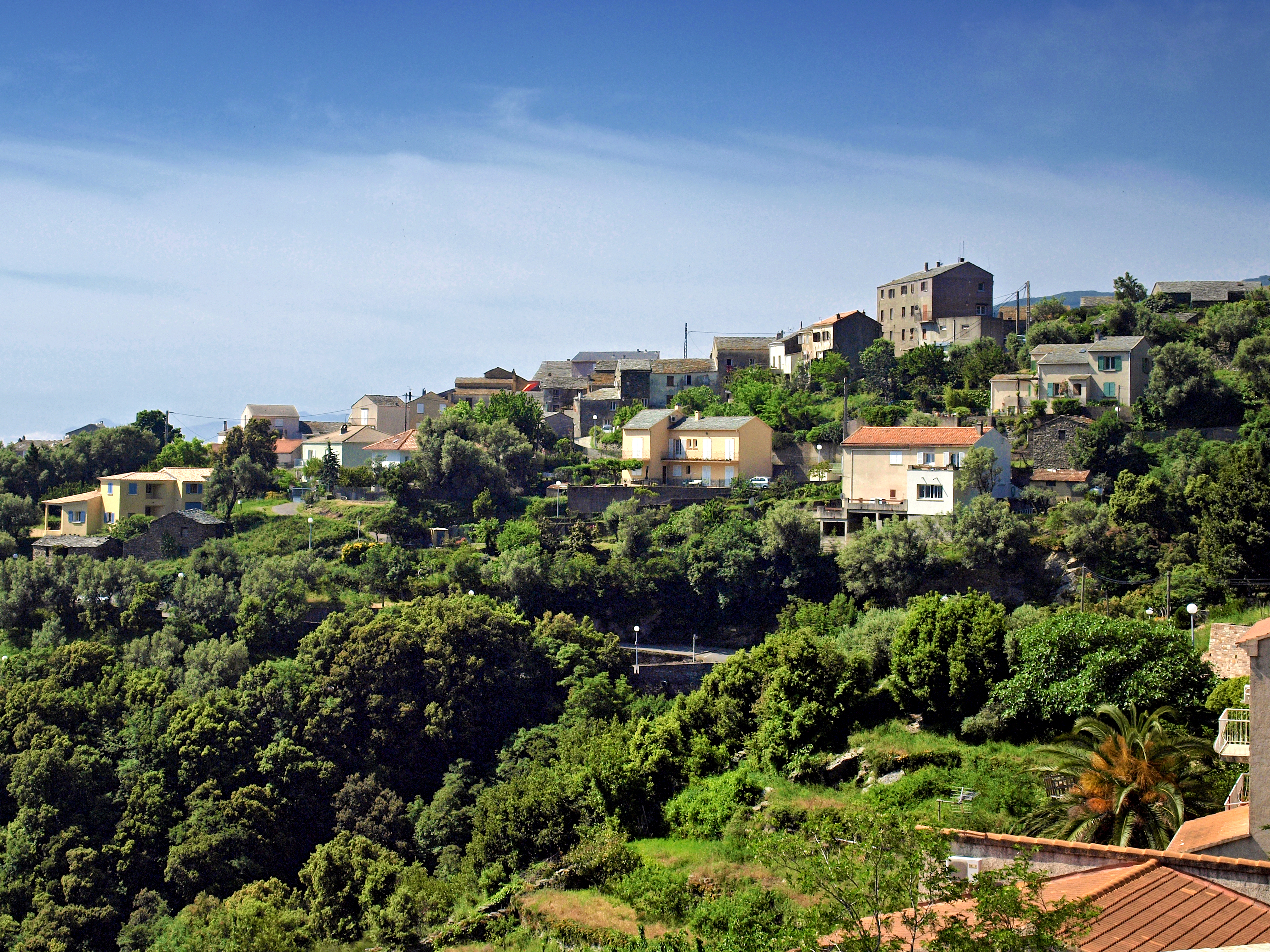 Ville-di-Pietrabugno (Corsica) - Guaitela